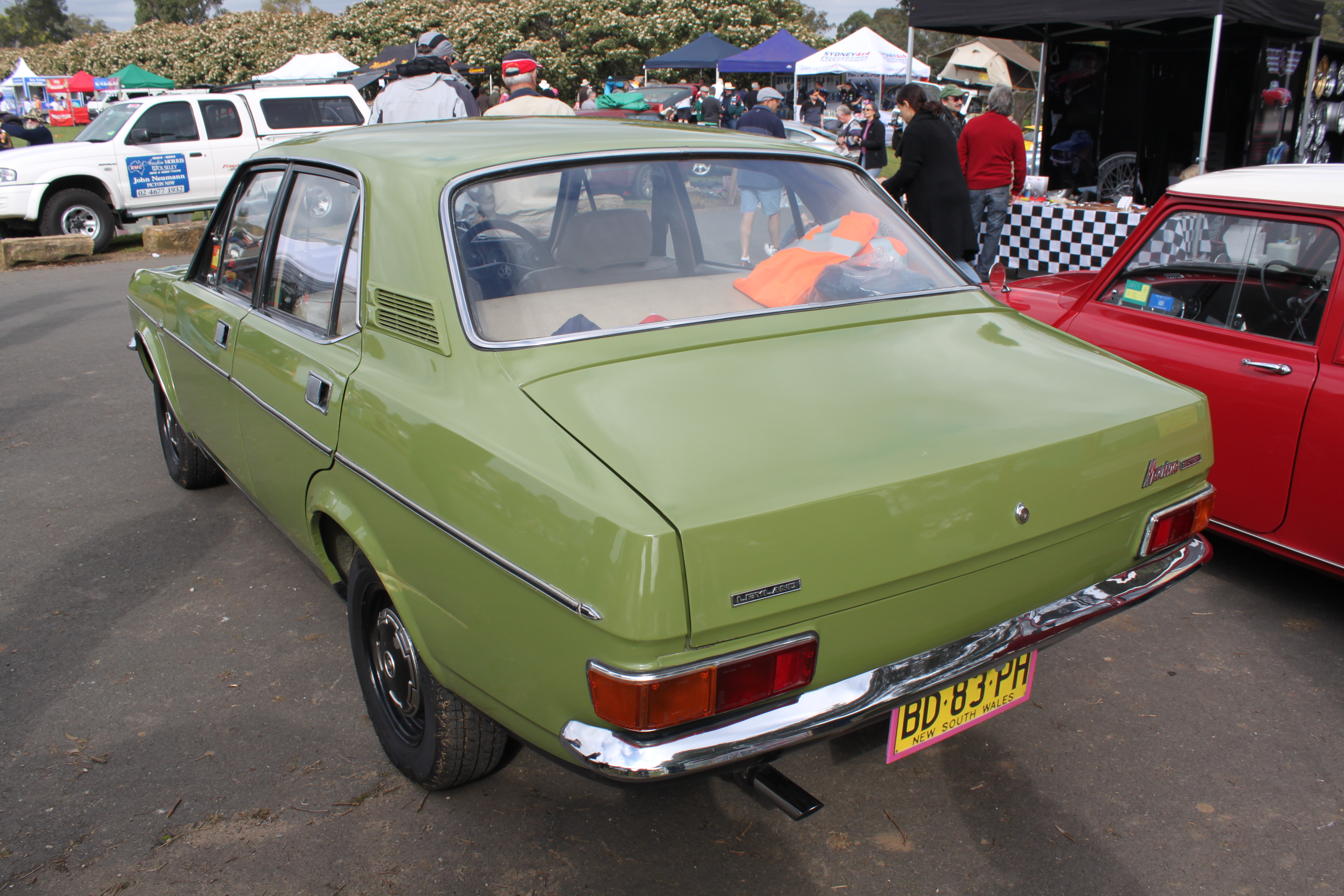 Leyland Marina